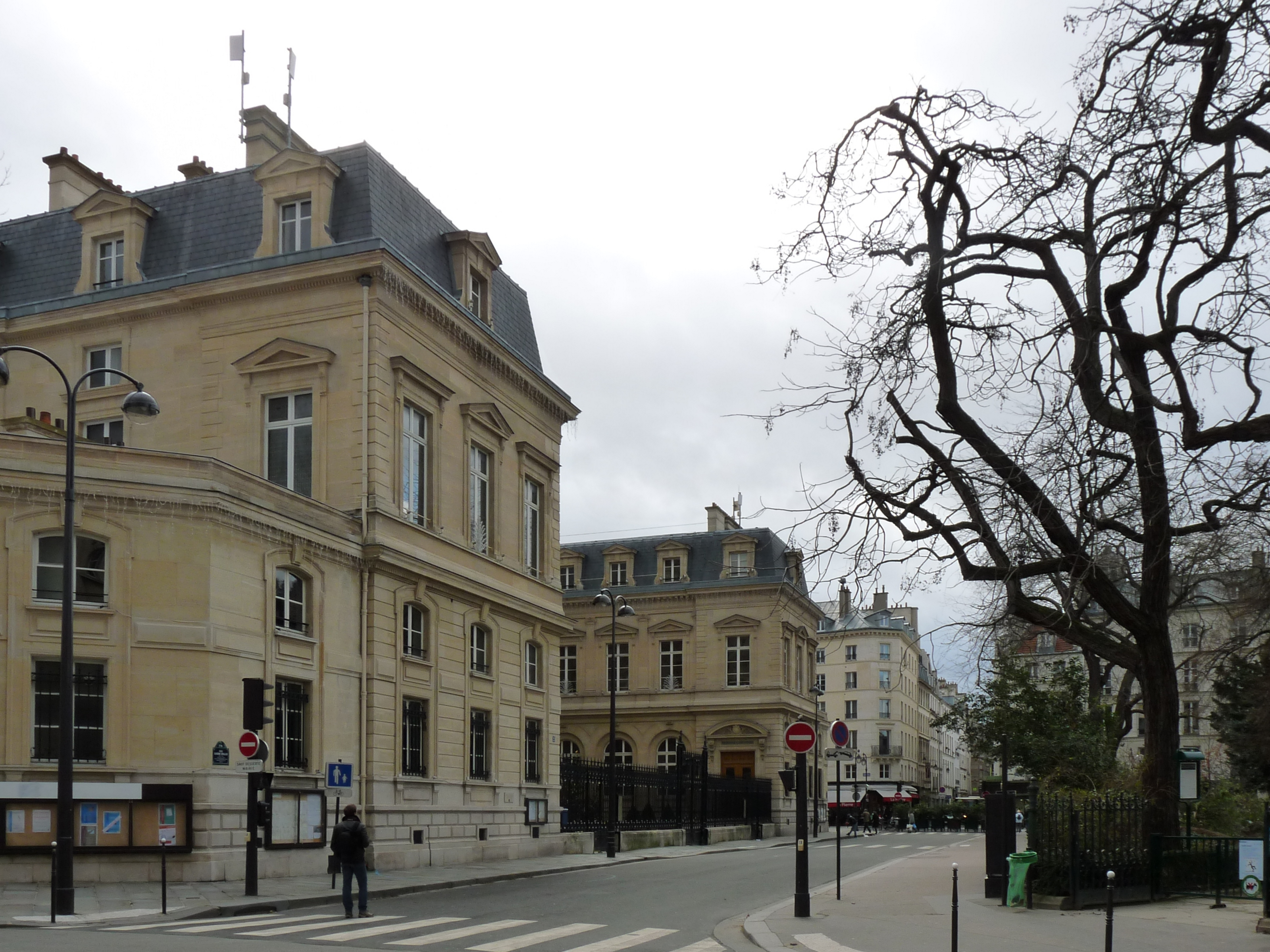 La rue Eugène Spuller à Paris, vue sur la marie du 3ème arrondissement